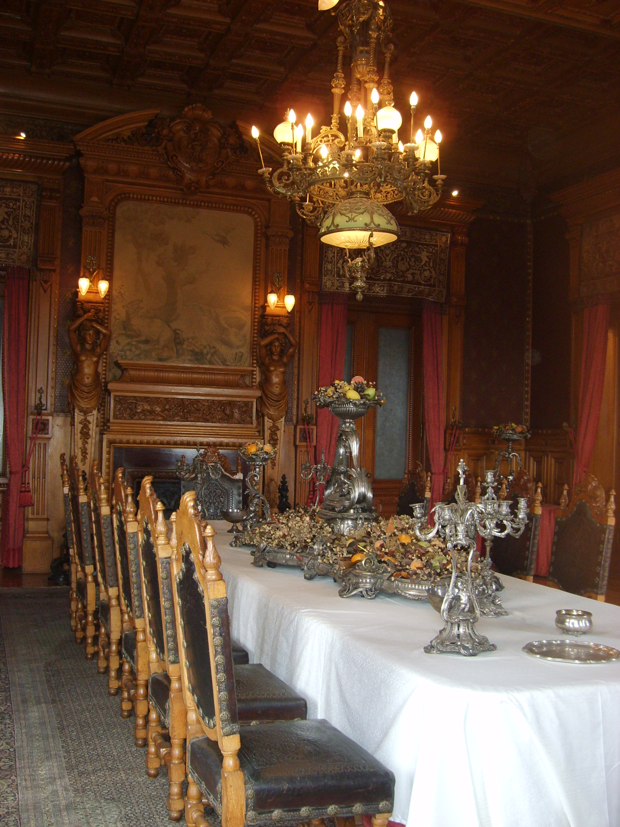 Comedor utilizado por Maximiliano y Carlota.